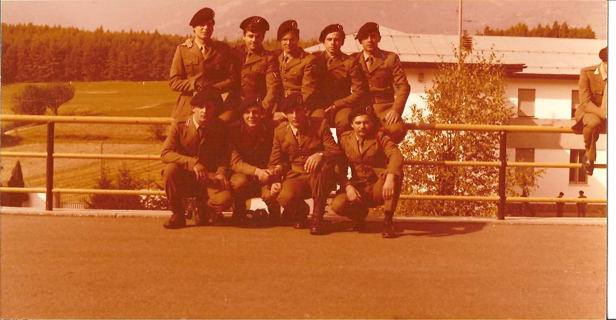 In ricordo del tempo passato insieme poco prima del congedo